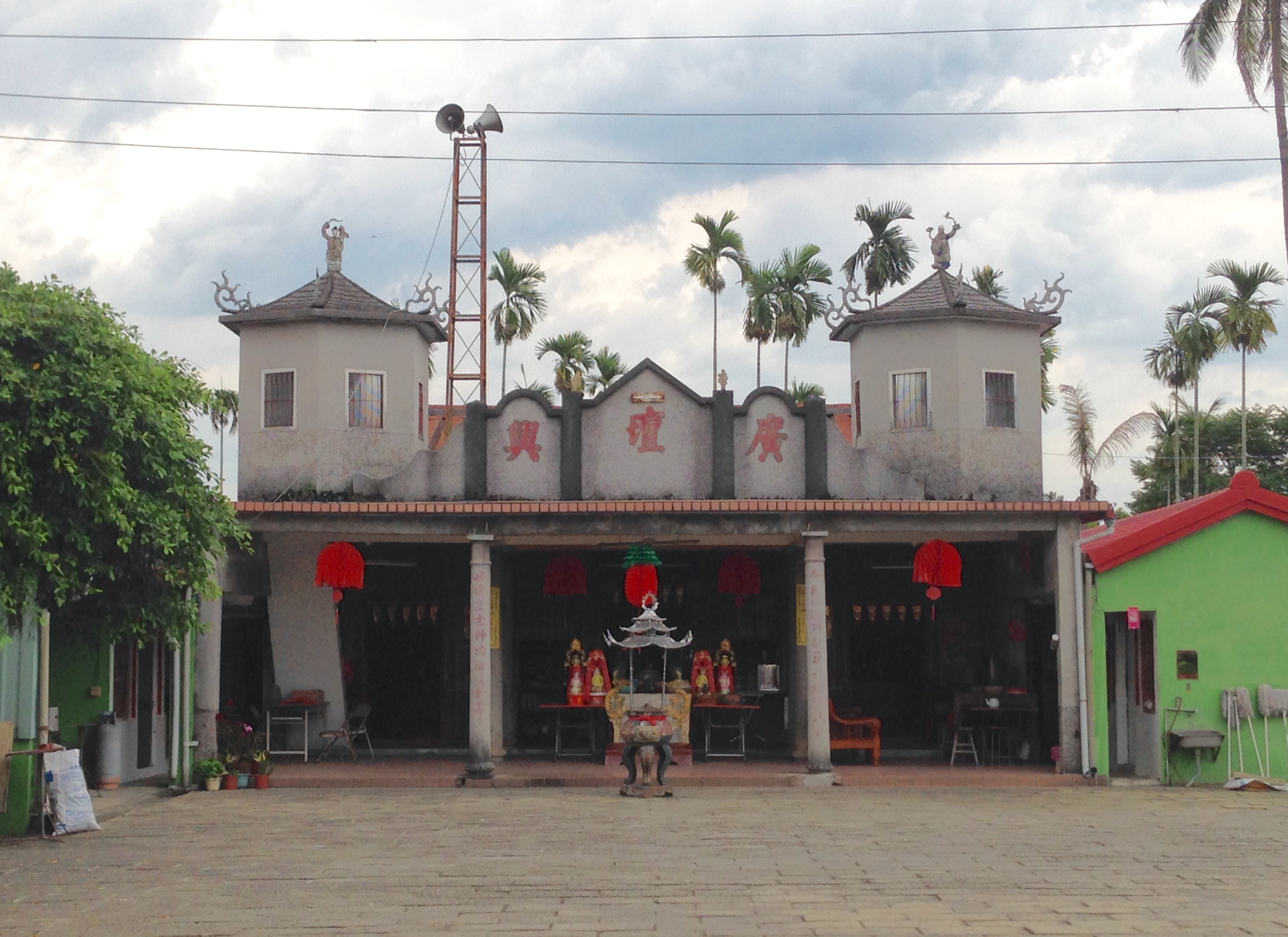 中文（台灣）: 廣興村廣興壇